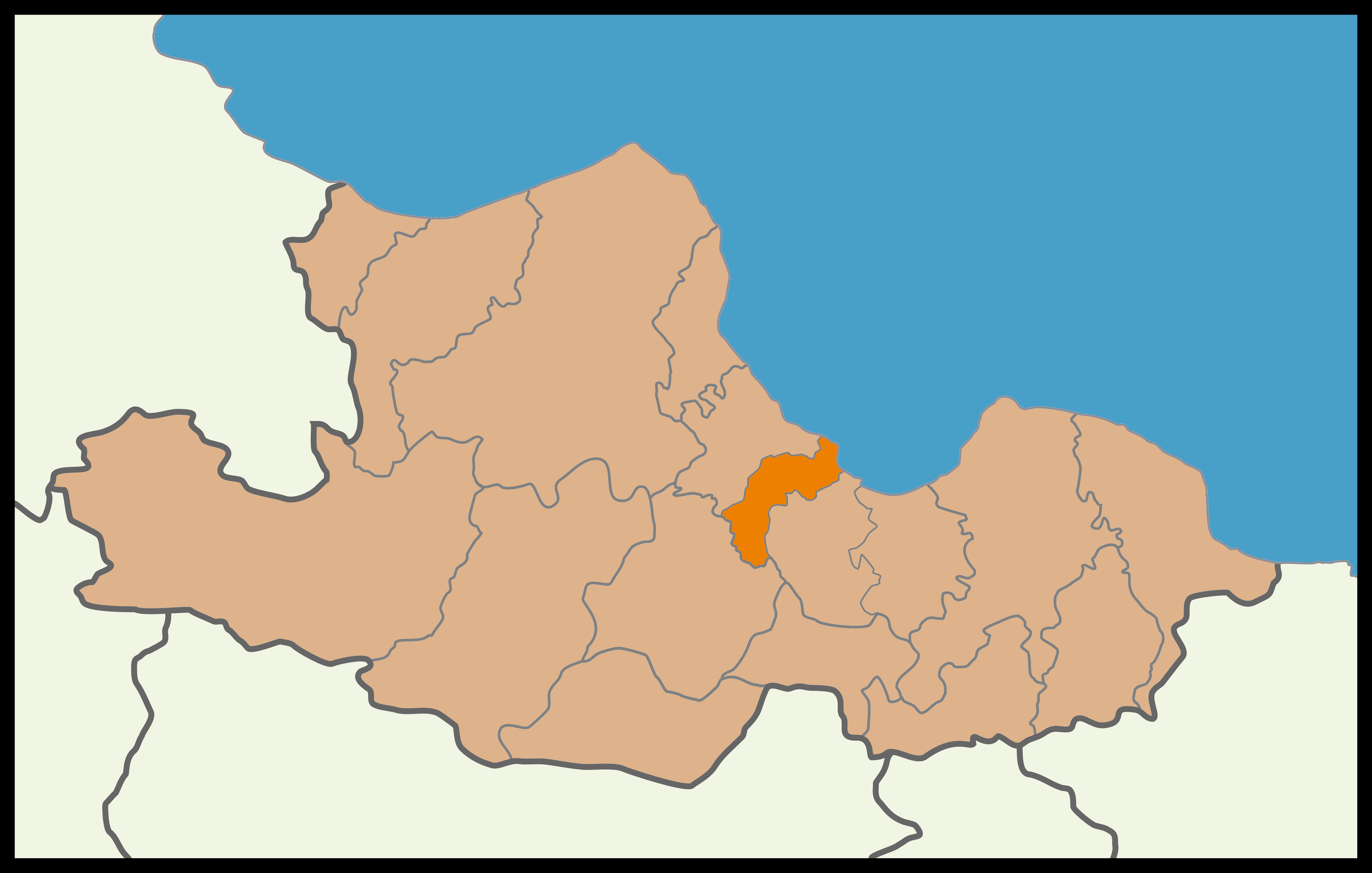 Samsun'un İlkadım ilçesinin 2014 Türkiye yerel seçimleri haritası.